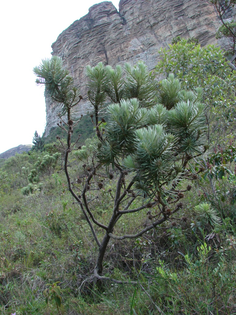 Lychnophora salicifolia - ASTERACEAE Parque Nacional da Chapada Diamantina - Palmeiras - Bahia - Brasil.